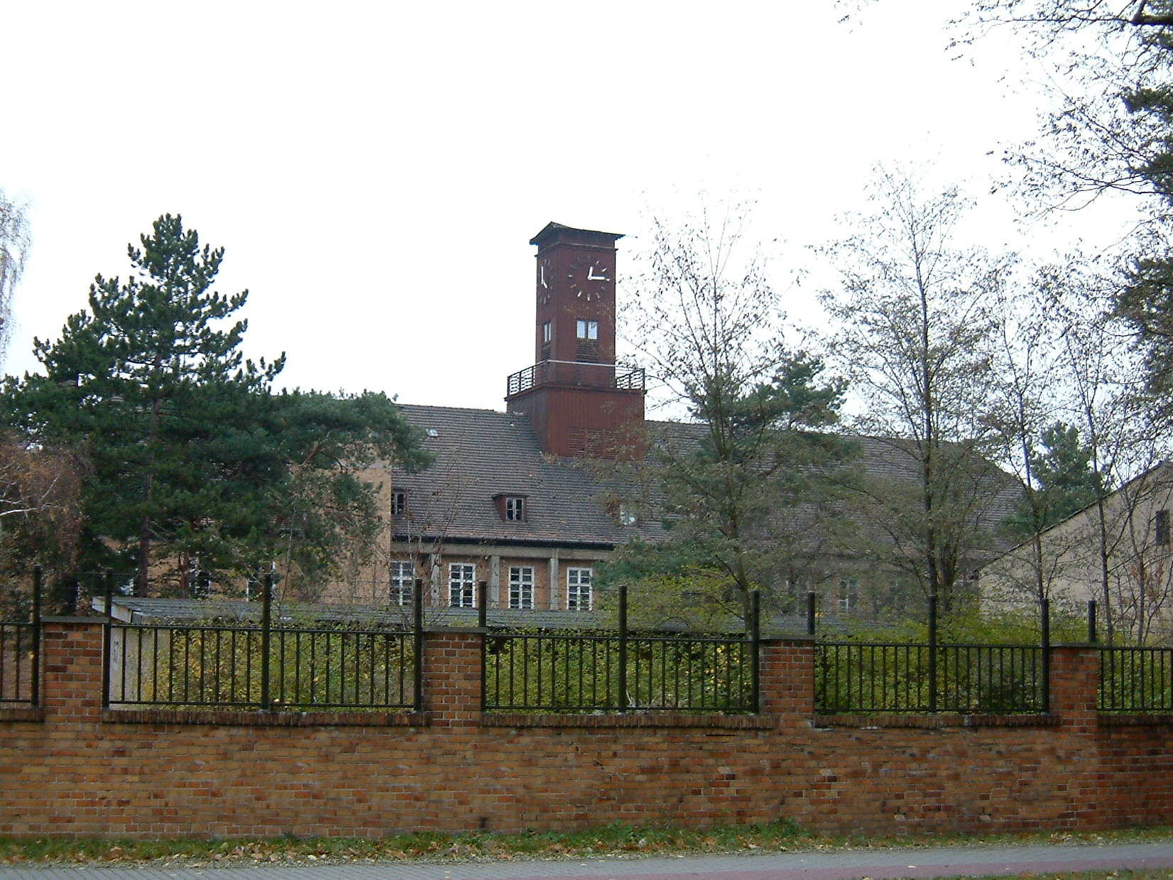 Kaserne Spremberg, Hauptgebäude mit Uhrenturm.